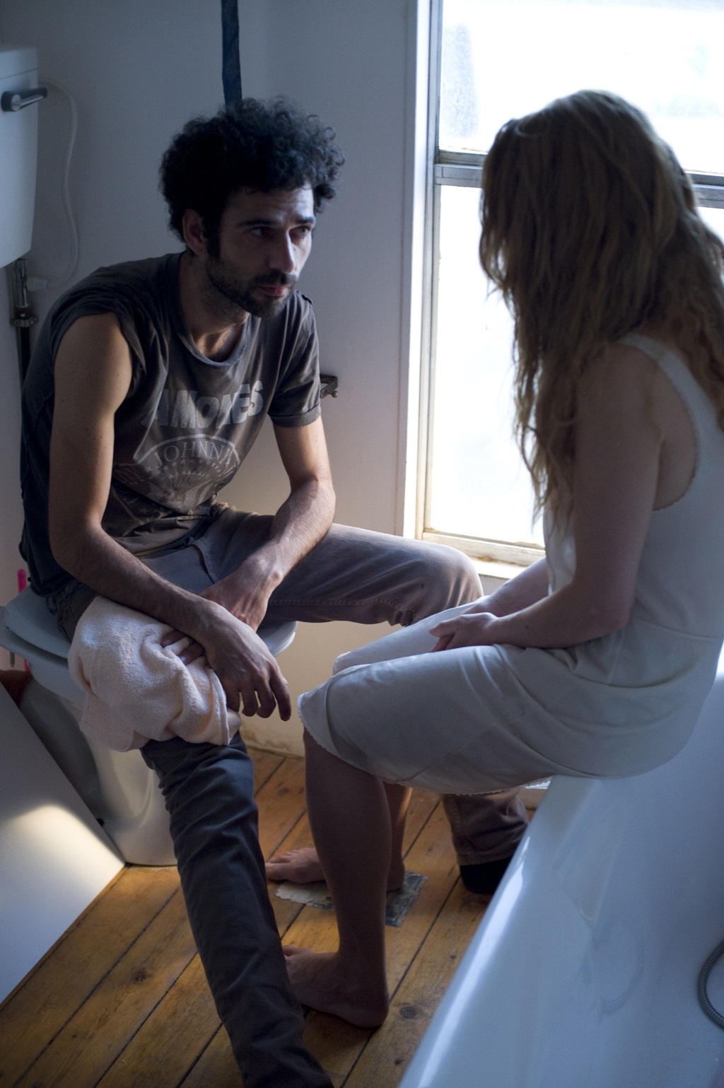 הילה וידור וקאיס נאשף